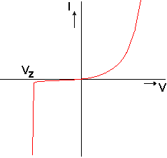 Zenerkarakteristiek.